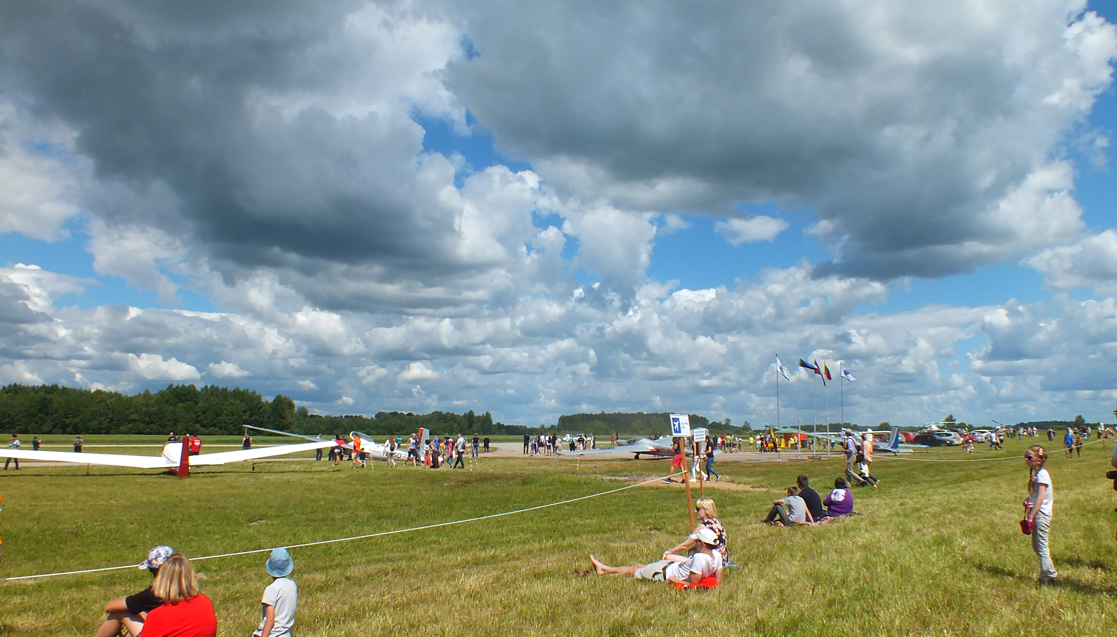 Aviācijas svētki Degumnieku lidlaukā 2017. gadā